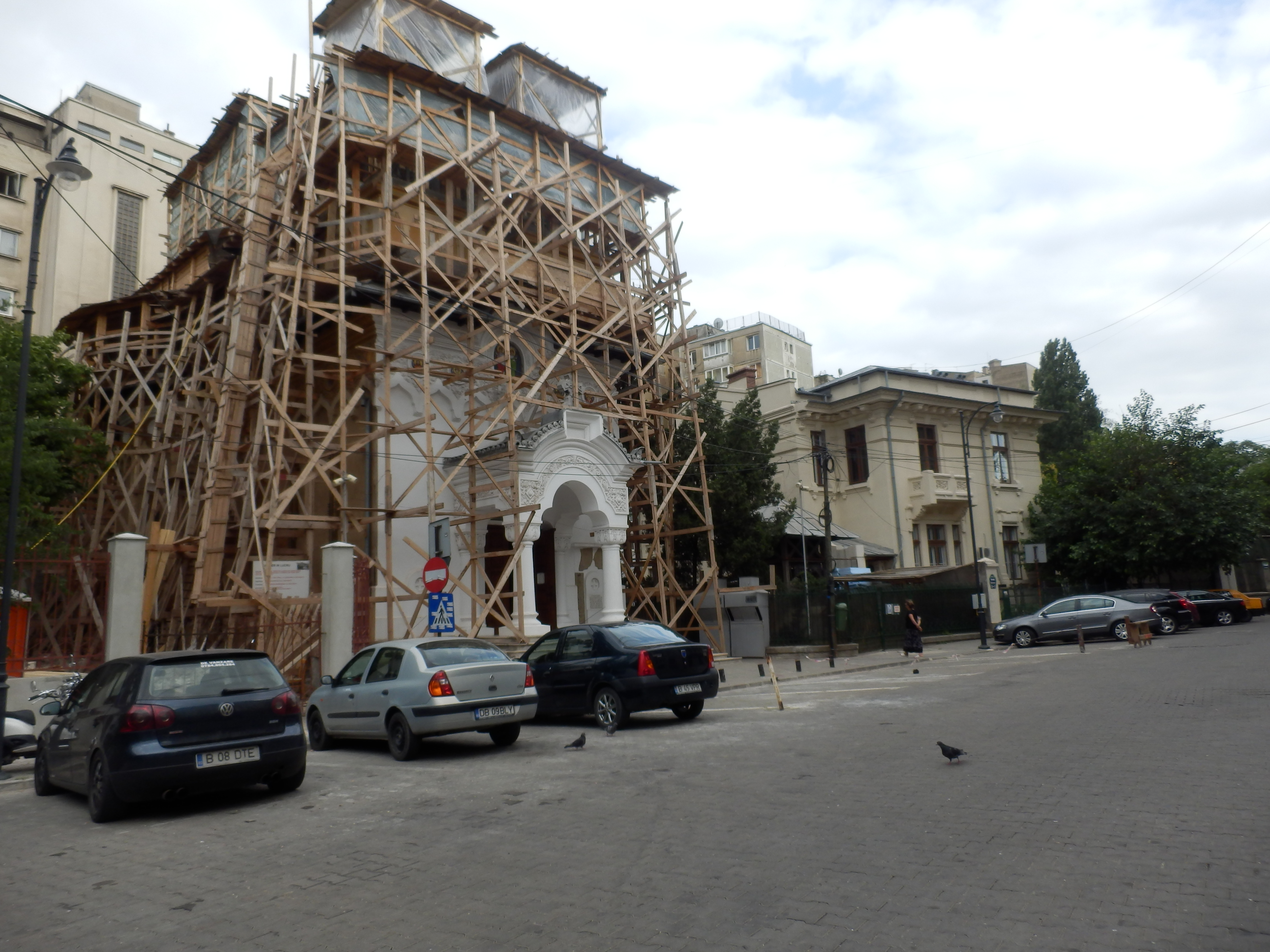 Bucharest, Romania